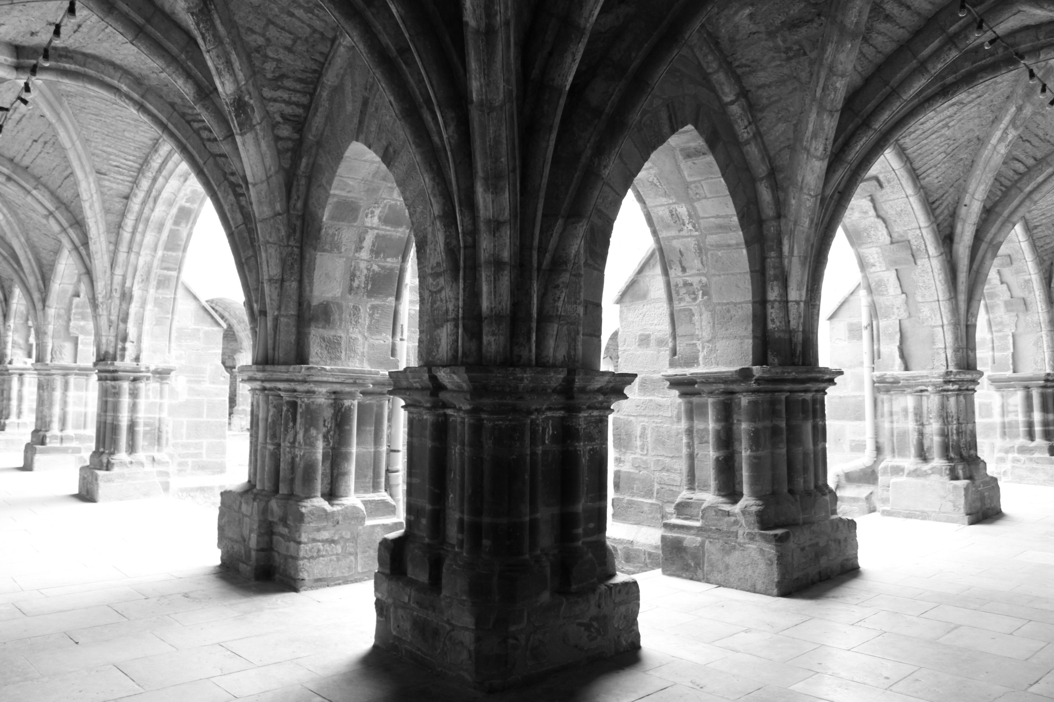 Luxeuil-les-Bains, France